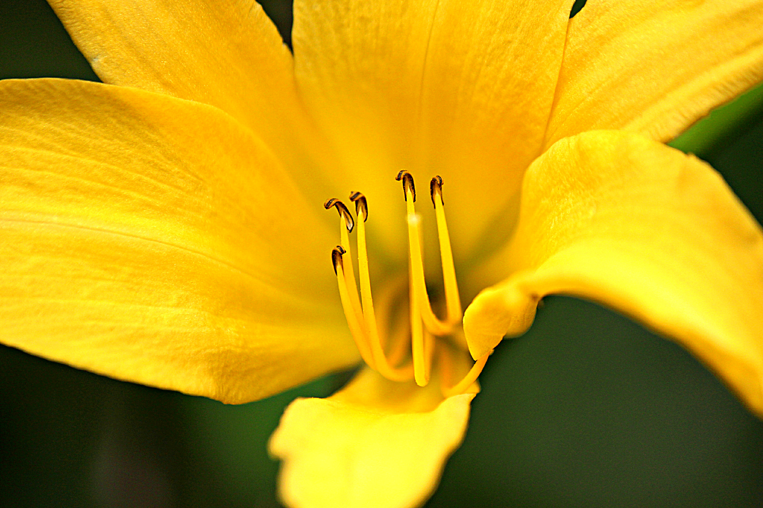 Acercamiento de una de las tantas flores hermosas que se encuentran en el Ávila.